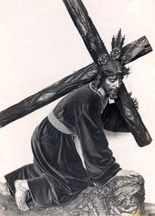 Jesús de las Tres Caidas (Huelva) en el taller de San Cristobal.